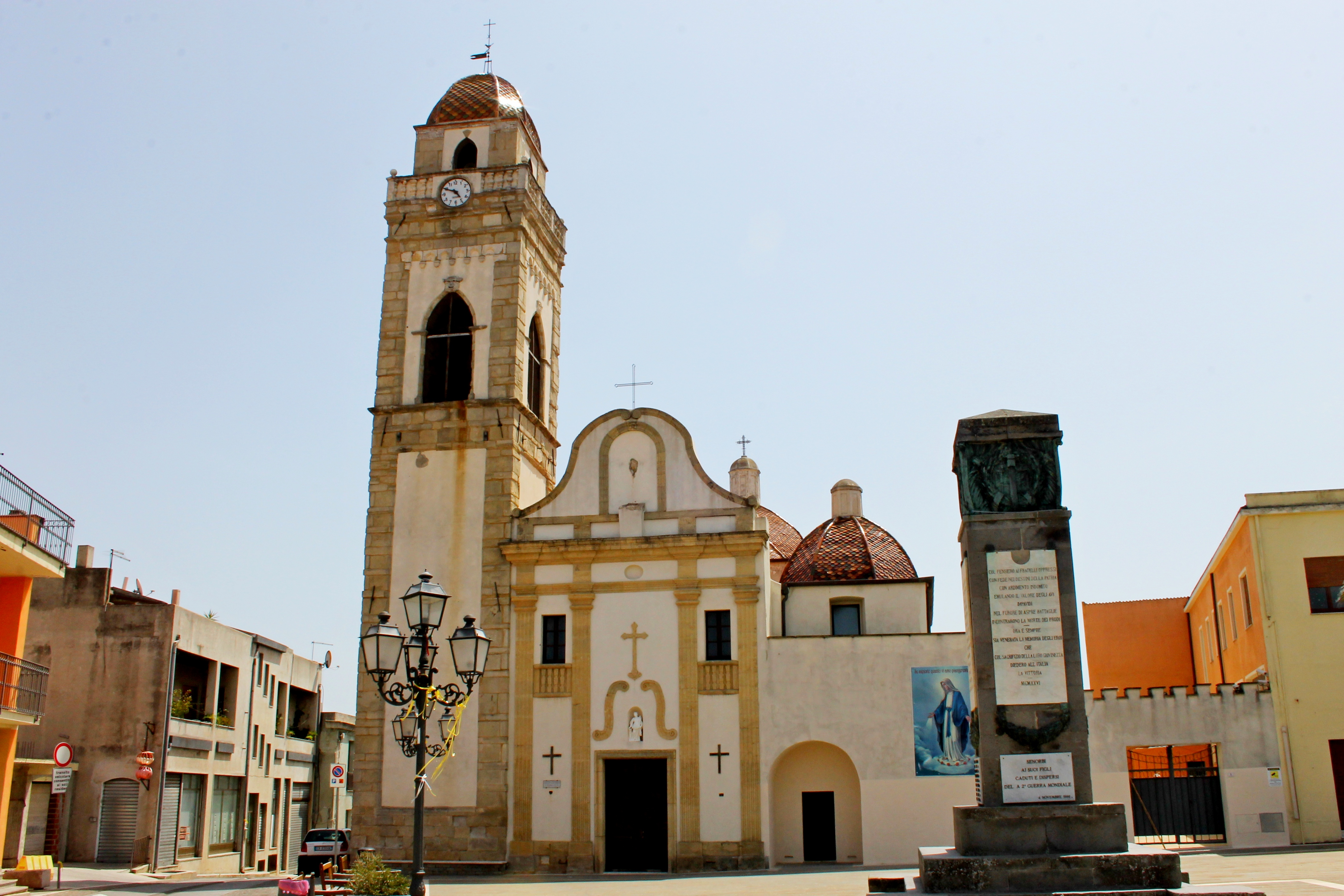 Chiesa di Santa Barbara, Senorbì